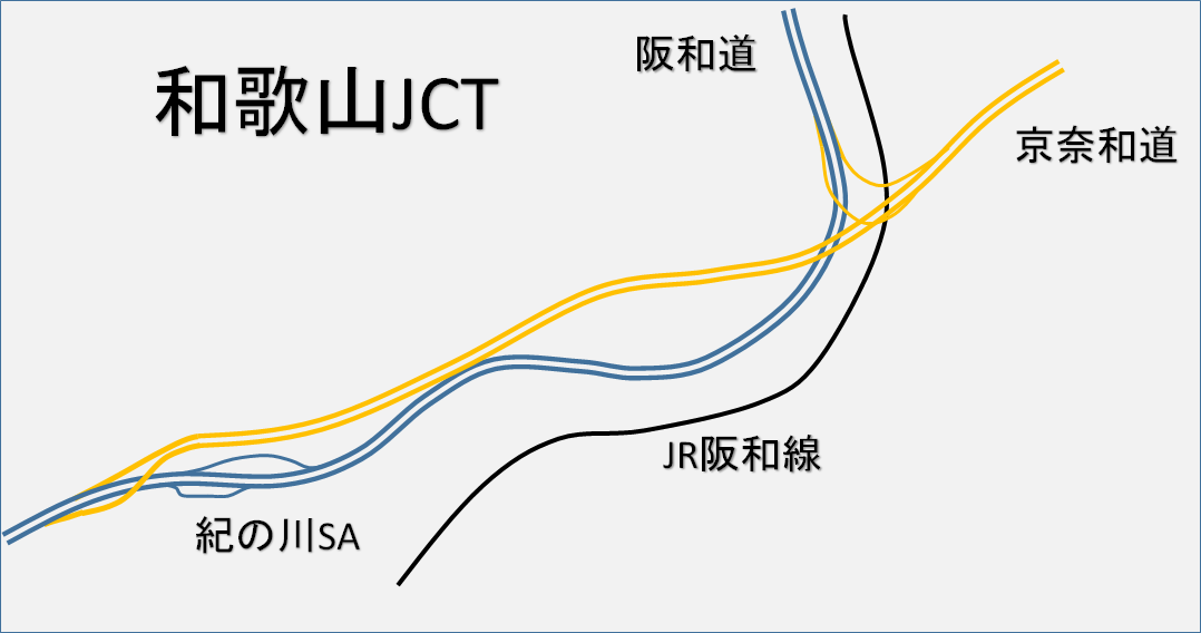 阪和道、京奈和道の和歌山ジャンクション